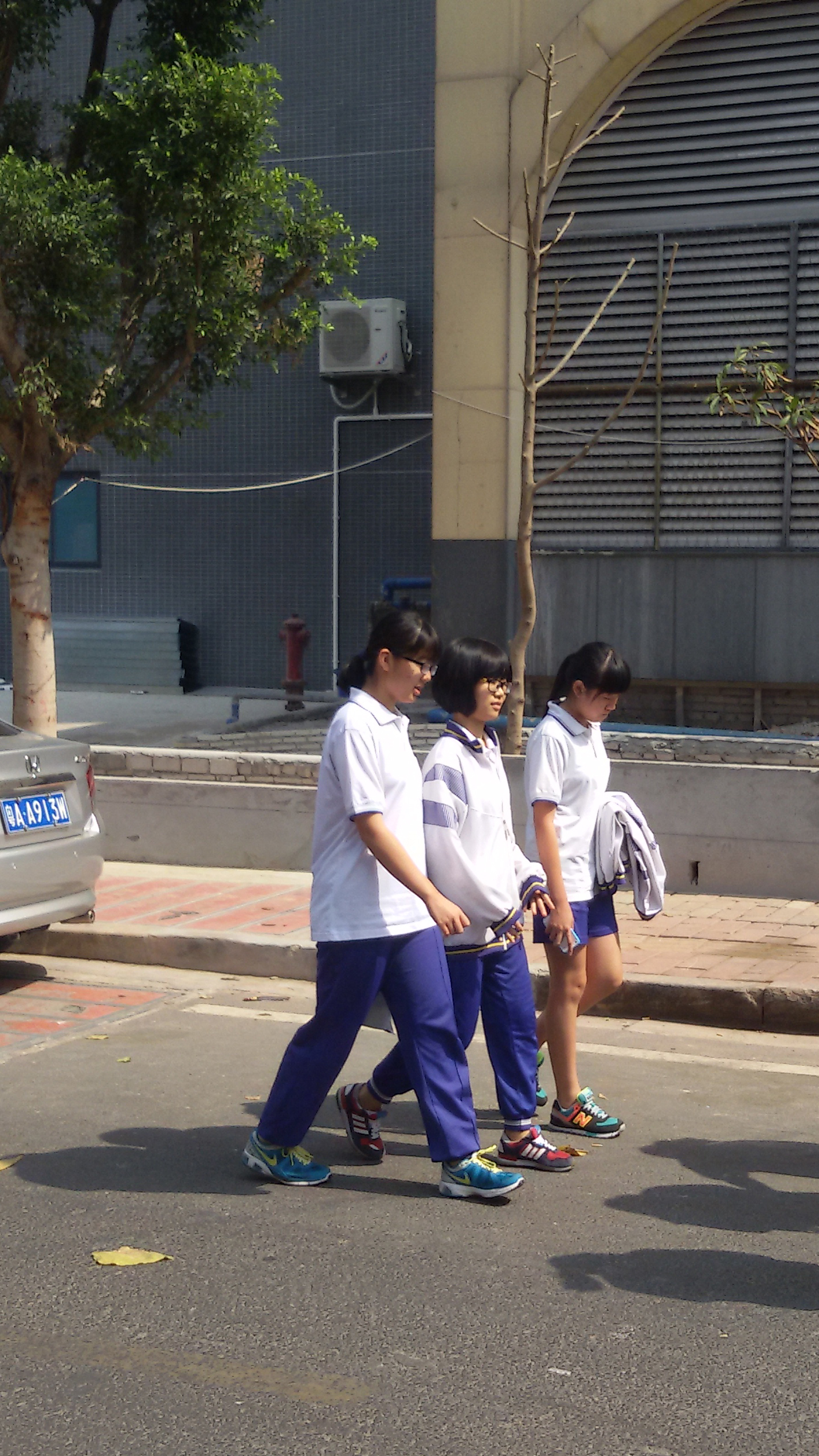 粵語: 廣州市第廿六中學嘅学生校服